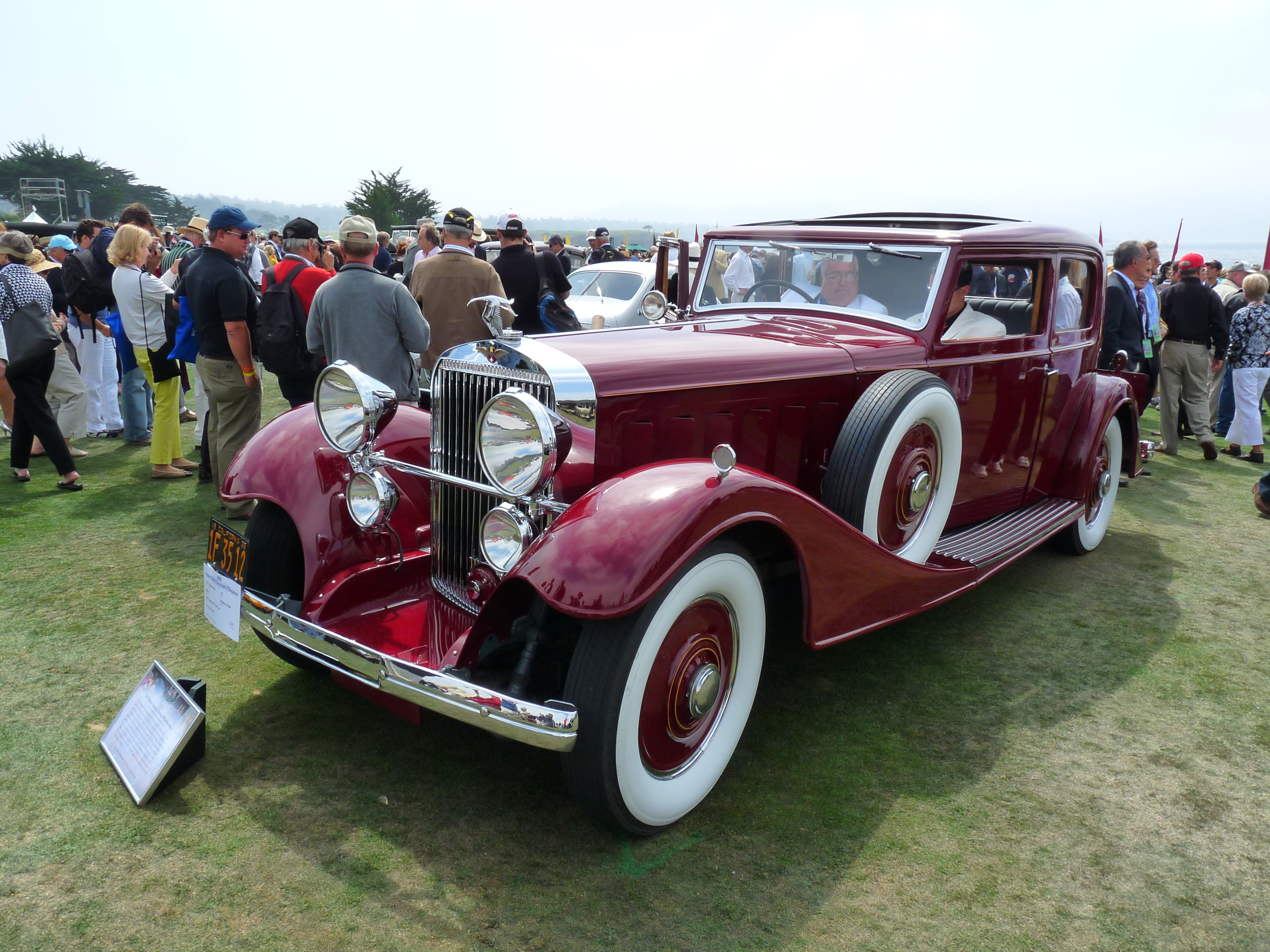 1935 Hispano Suiza J12 Kellner Pillarless Sedan